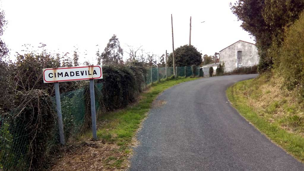 Vista de Cimadevila, Cedeira.